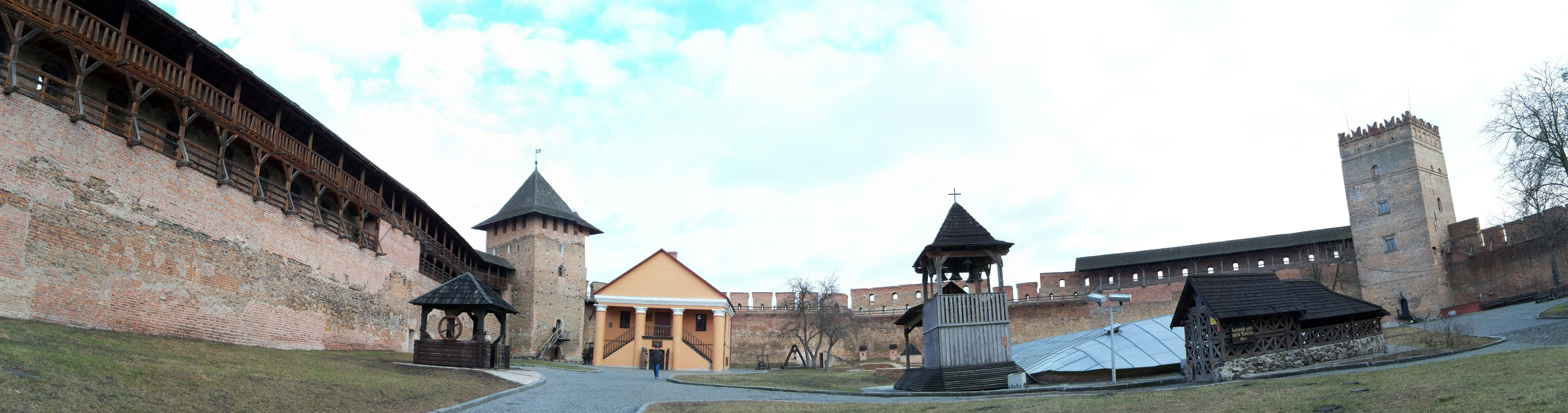 Єпископський будинок (мур.), Луцьк, вул. Кафедральна, 1а